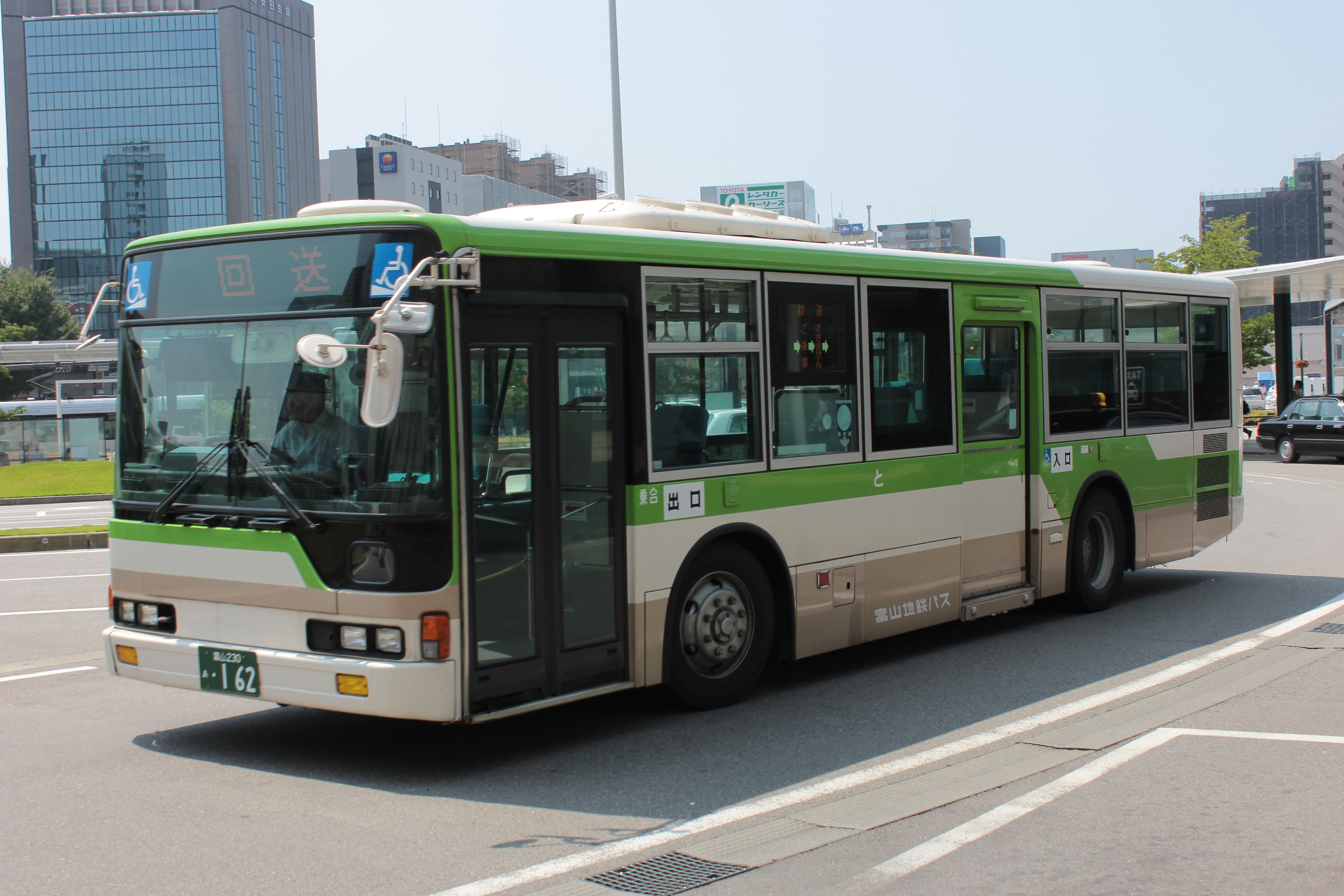 富山地方鉄道の路線バス（三菱ふそう・エアロスター、KL-MP37JK） Canon EOS Kiss X5